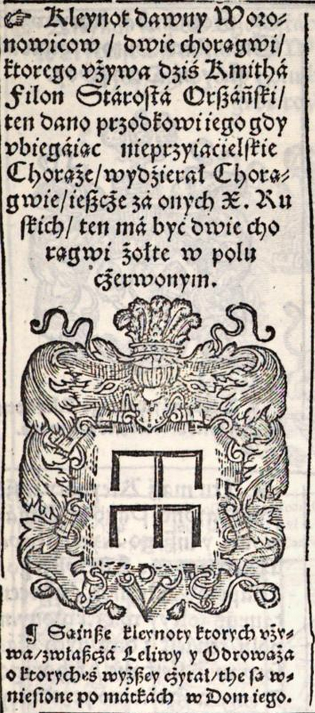 Герб Вороновичей в книге Bartoszа Paprockiego "Gniazdo cnoty : zkąd herby rycerstwa sławnego Krolestwa Polskiego, Wielkiego Księstwa Litewskiego, Ruskiego, Pruskiego, Mazowieckiego, Zmudzkiego y inszych Państw do tego Krolestwa nalezacych Książąt y Panow poczatek swoy maią". Kraków: 1578, s. 1187